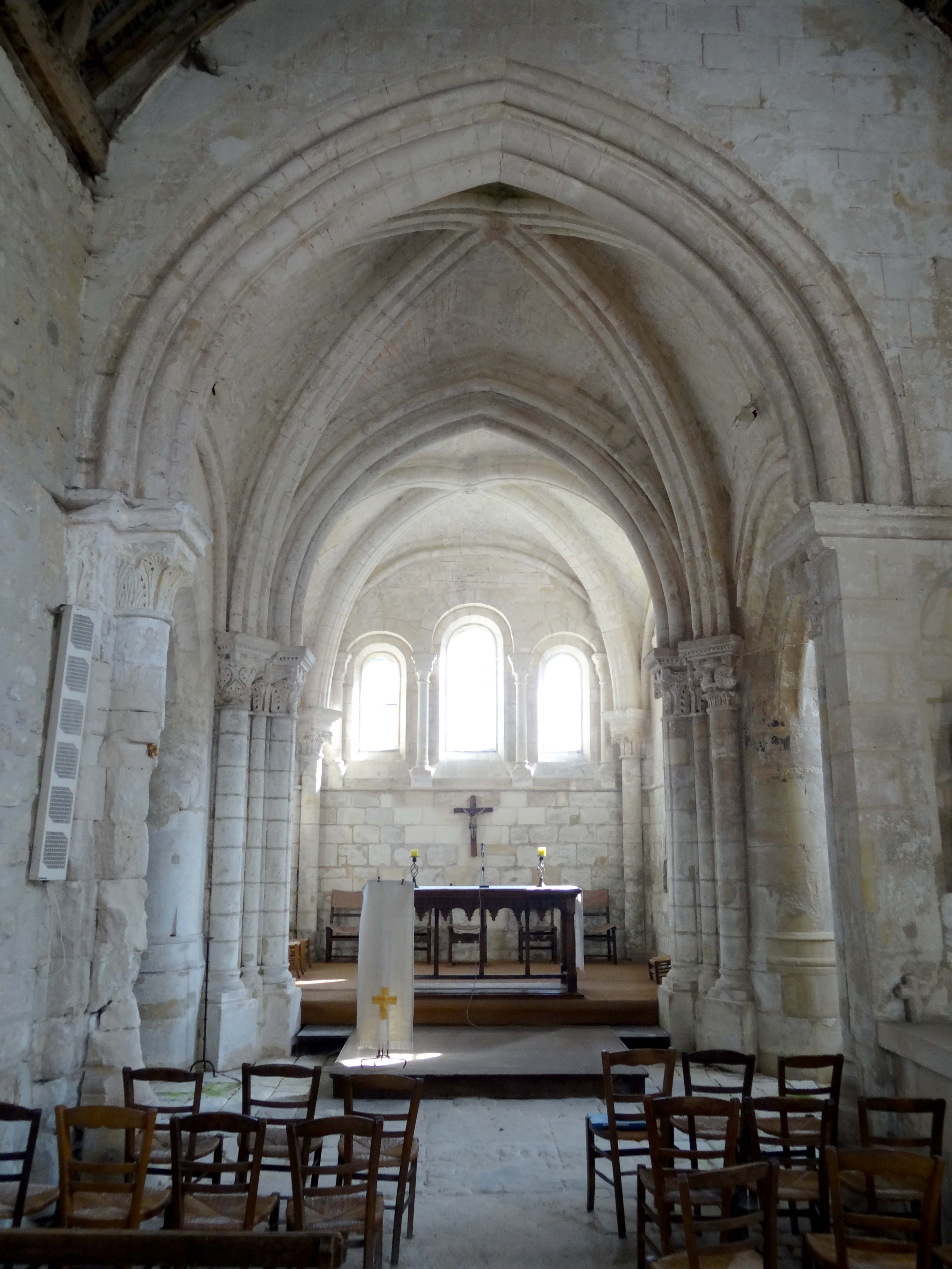 Intérieur de l'église - voir titre.